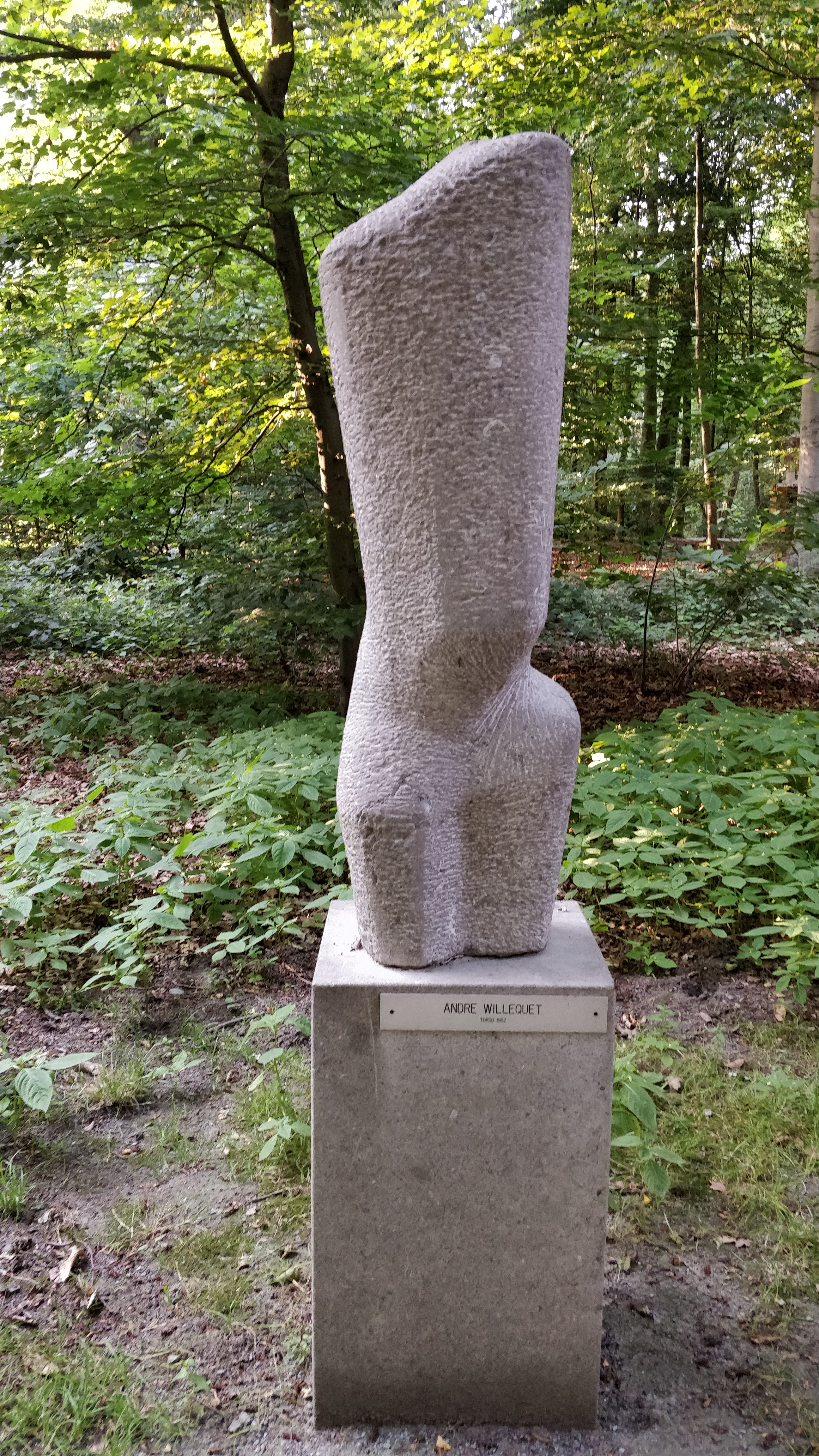 Torso, Andre Willequet, Middelheimmuseum